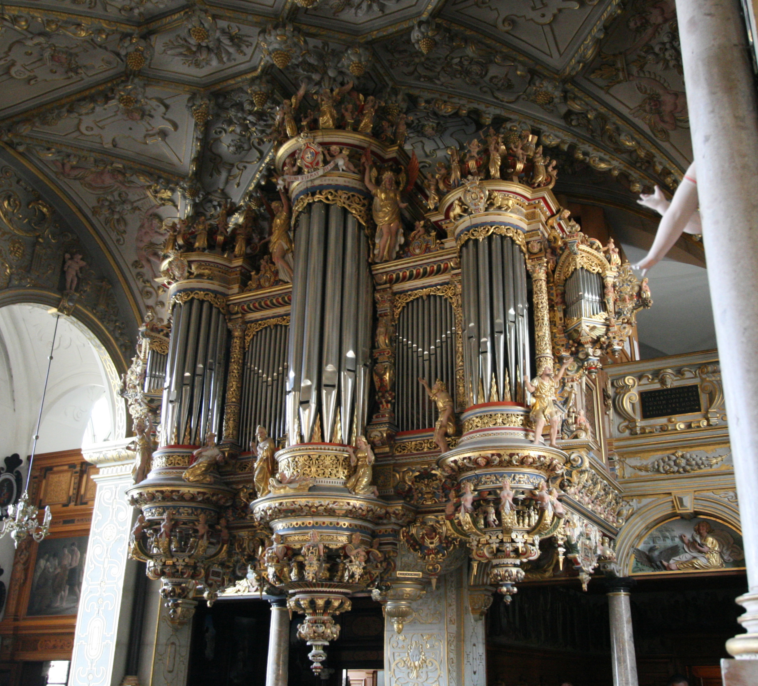 Frederiksborg Slotkirke, Hillerød, Denmark. Organ